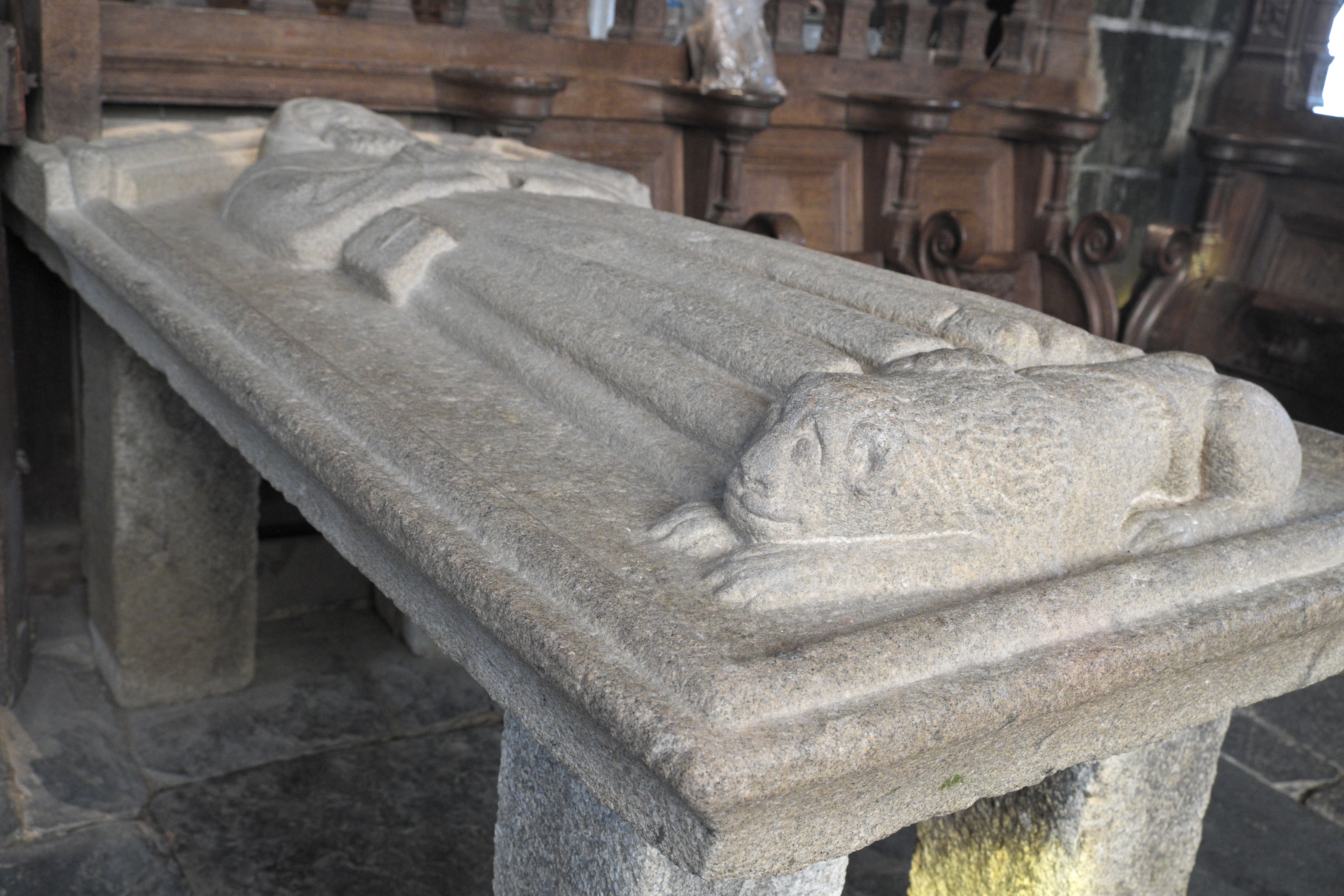 Kapelle Saint-Herbot in Saint-Herbot (Plonévez-du-Faou) im Département Finistère (Region Bretagne/Frankreich), Grab mit der Liegefigur des heiligen Herbot aus Granit, aus dem 15. oder 16. Jahrhundert